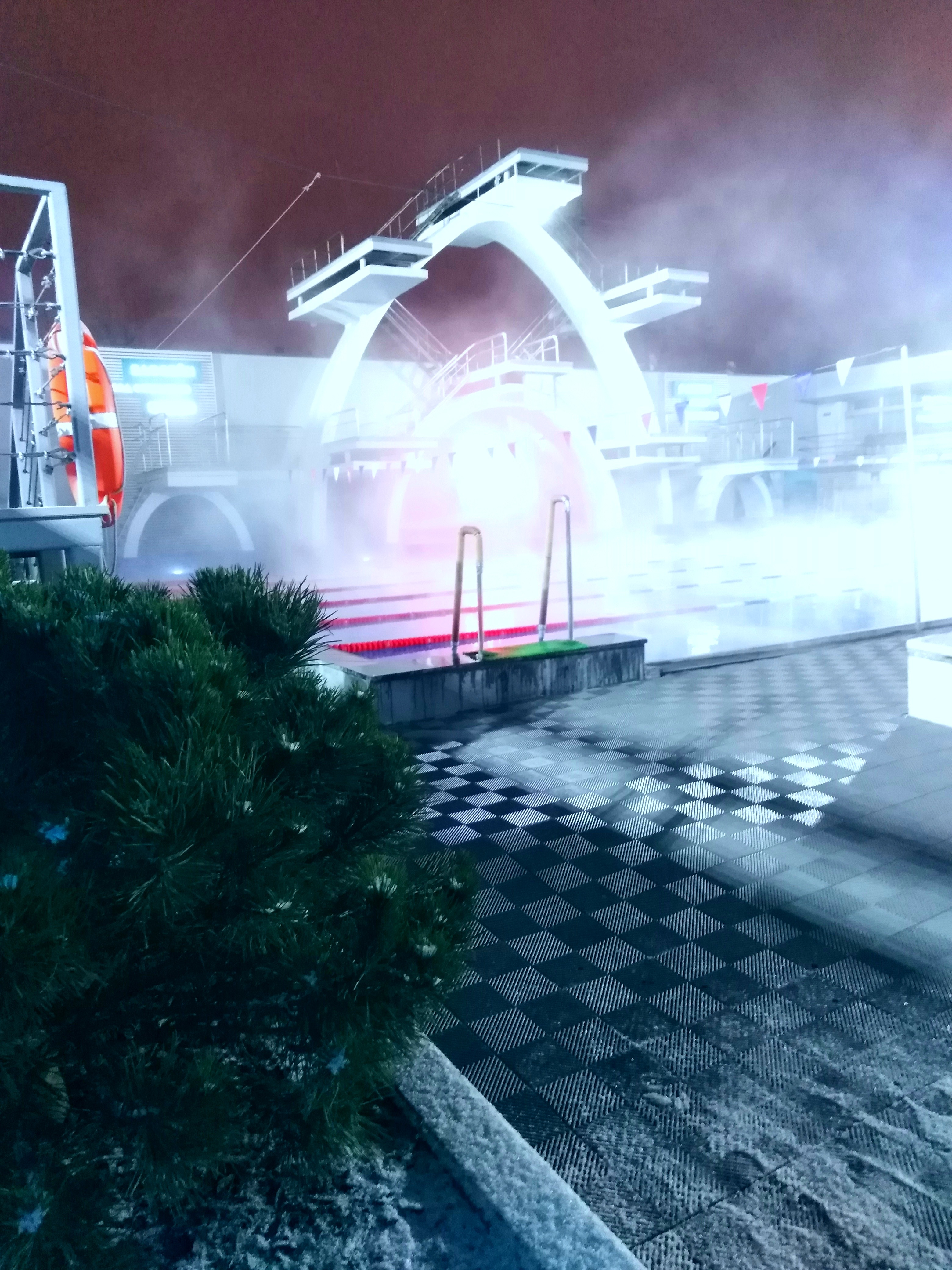 Бассейн Чайка зимой 2020 г. Вид на 25-метровый бассейн и вышки для прыжков.